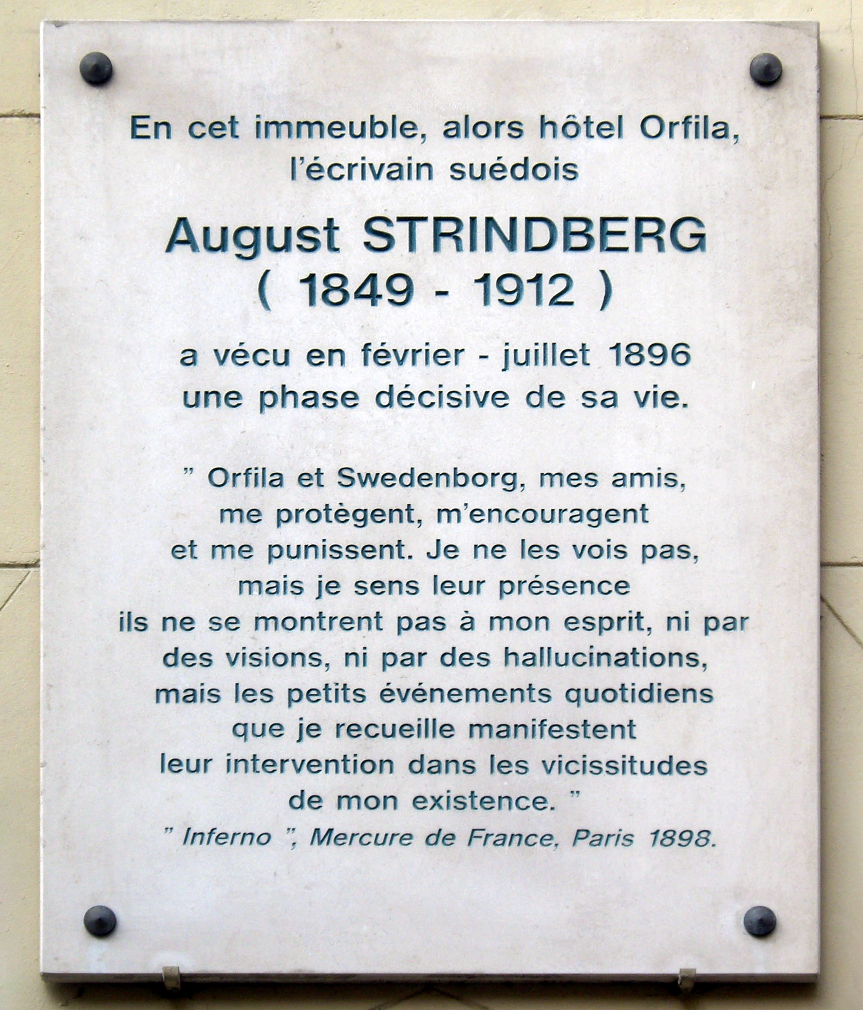 Plaque apposée au n° 62 de la rue d'Assas, Paris 6e. Texte :En cet immeuble, alors hôtel Orfila, August Strindberg (1849-1912) a vécu en février-juillet 1896 une phase décisive de sa vie. « Orfila et Swedenborg, mes amis, me protègent, m'encouragent et me punissent. Je ne les vois pas, mais je sens leur présence, ils ne se montrent pas à mon esprit, ni par des visions, ni par des hallucinations, mais les petits événements quotidiens que je recueille manifestent leur intervention dans les vicissitudes de mon existence. » Inferno, Mercure de France, Paris, 1898.